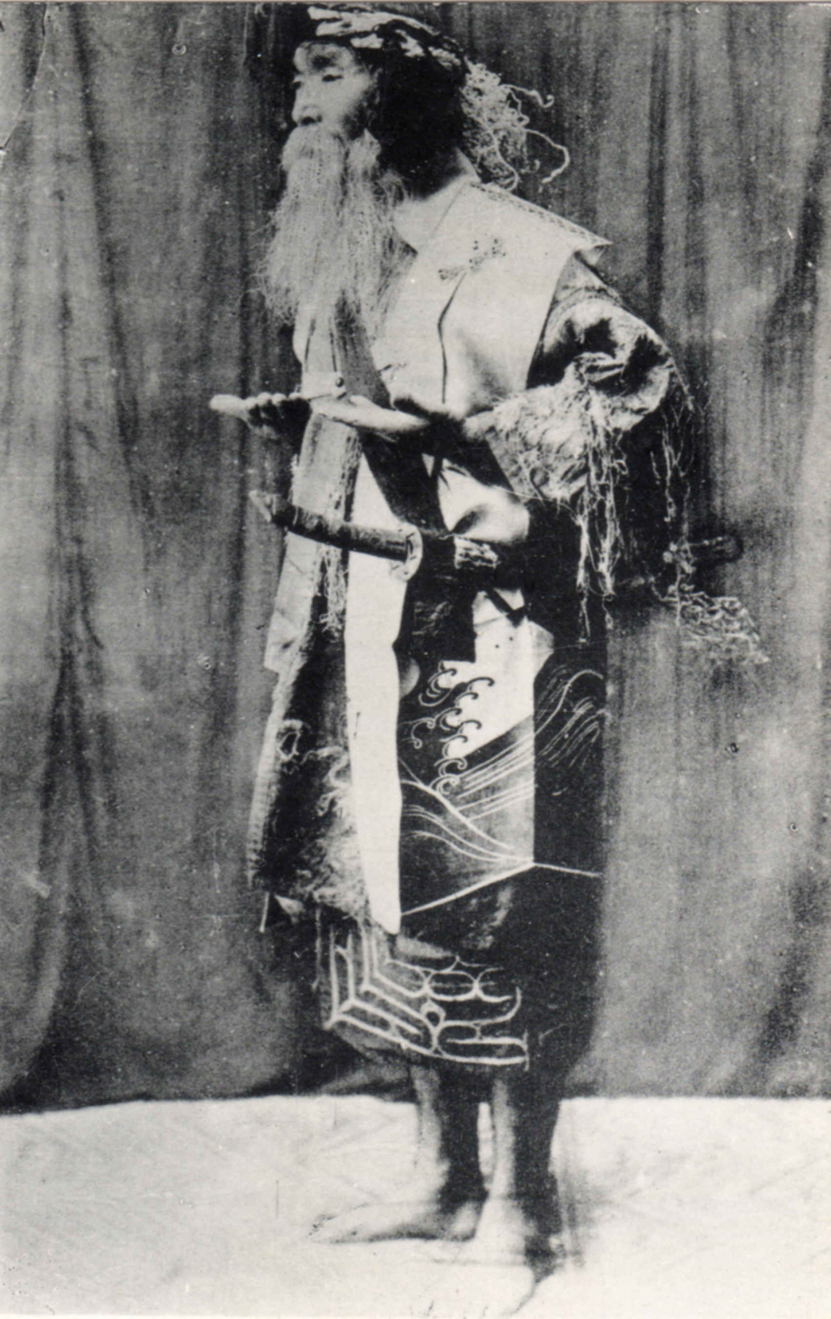 8枚1セットの戦前の絵葉書より。袋の表紙に『北海道土人 アイヌ風俗』と書かれている。葉書の隅に、MANNERS OF AINU FOLK-WAYS．HOKKAIDOとある。